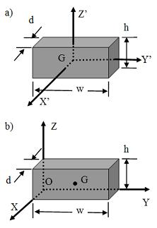 實心長方體